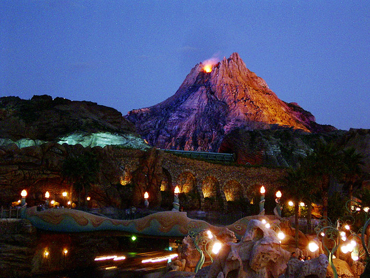 中文（台灣）: 東京迪士尼海洋中的地標「普羅美修士火山」，夜晚的樣子